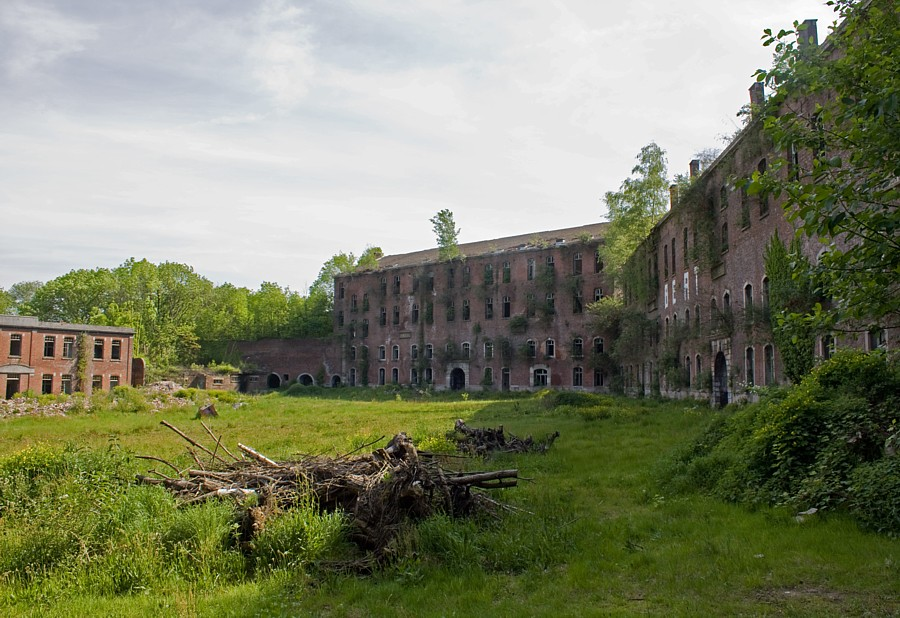 Site van Chartreuse, welk deel van de site al is ingedeeld per van 13 januari 1989) en het park van de Oblats